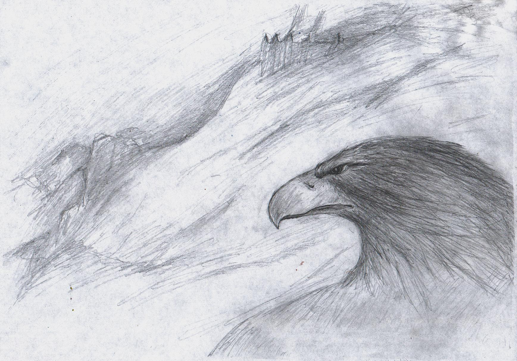 El águila Gwaihir, de las novelas El hobbit y El Señor de los Anillos, de J. R. R. Tolkien.